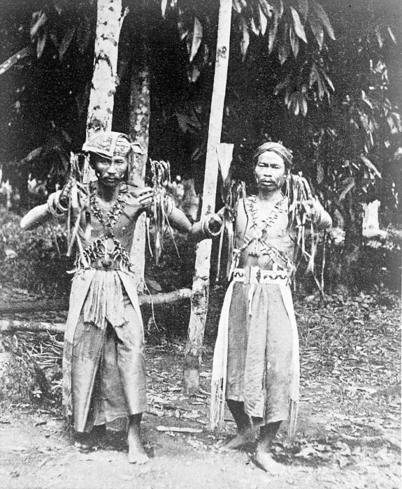 Repronegatief. Dansende medicijnmannen van de Dusun-Dajaks uit West-Borneo